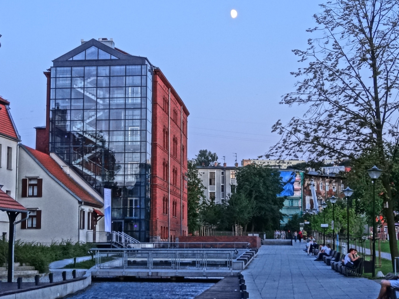 Kaskada Międzywodzie na Wyspie Młyńskiej w Bydgoszczy, odtworzona w 2007 roku